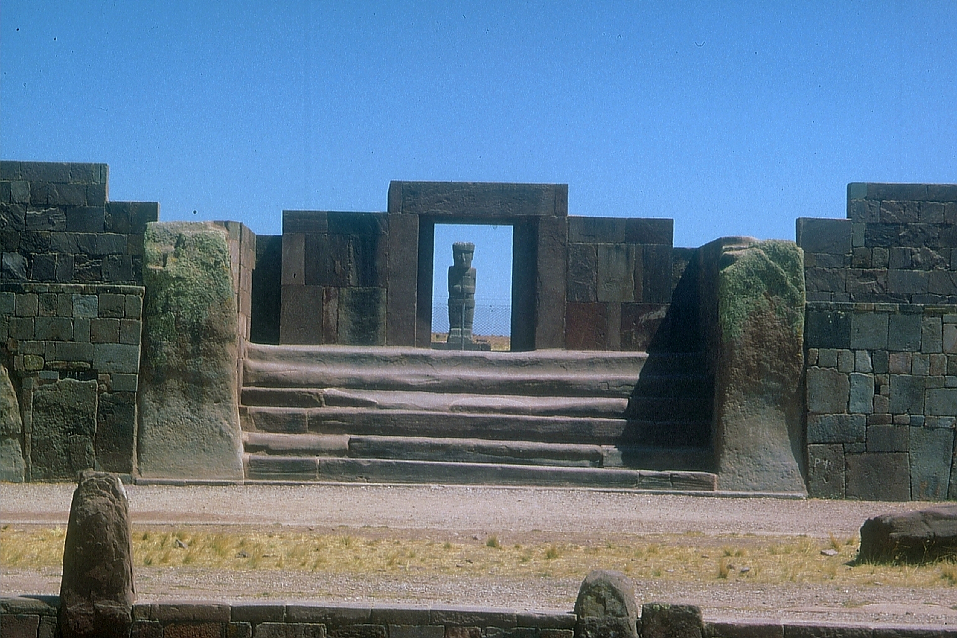 Tiwanaku - megalithisches Eingangstor zur Kalasaya-Plattform, mit Statue